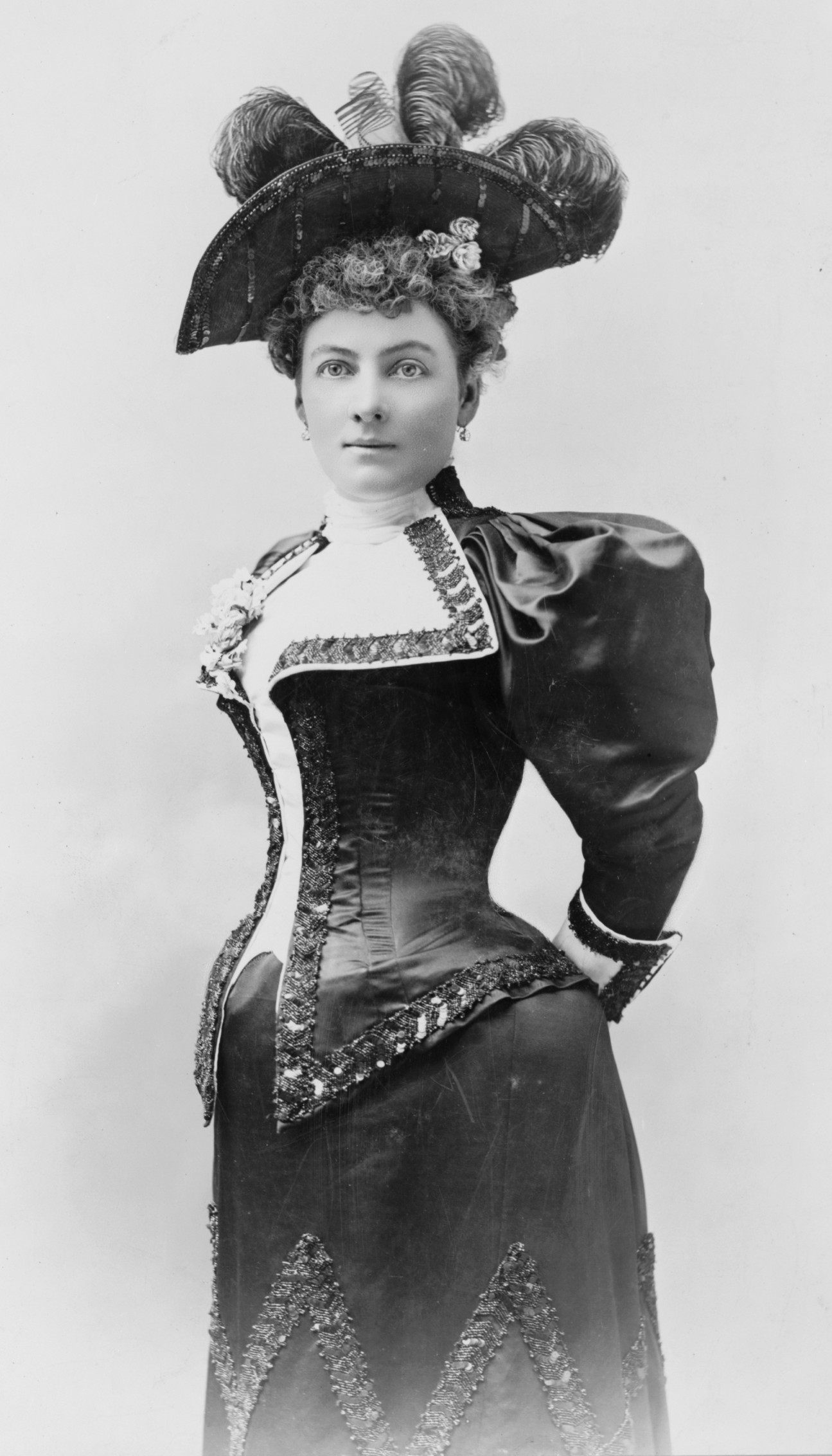 Laura Jean Libbey